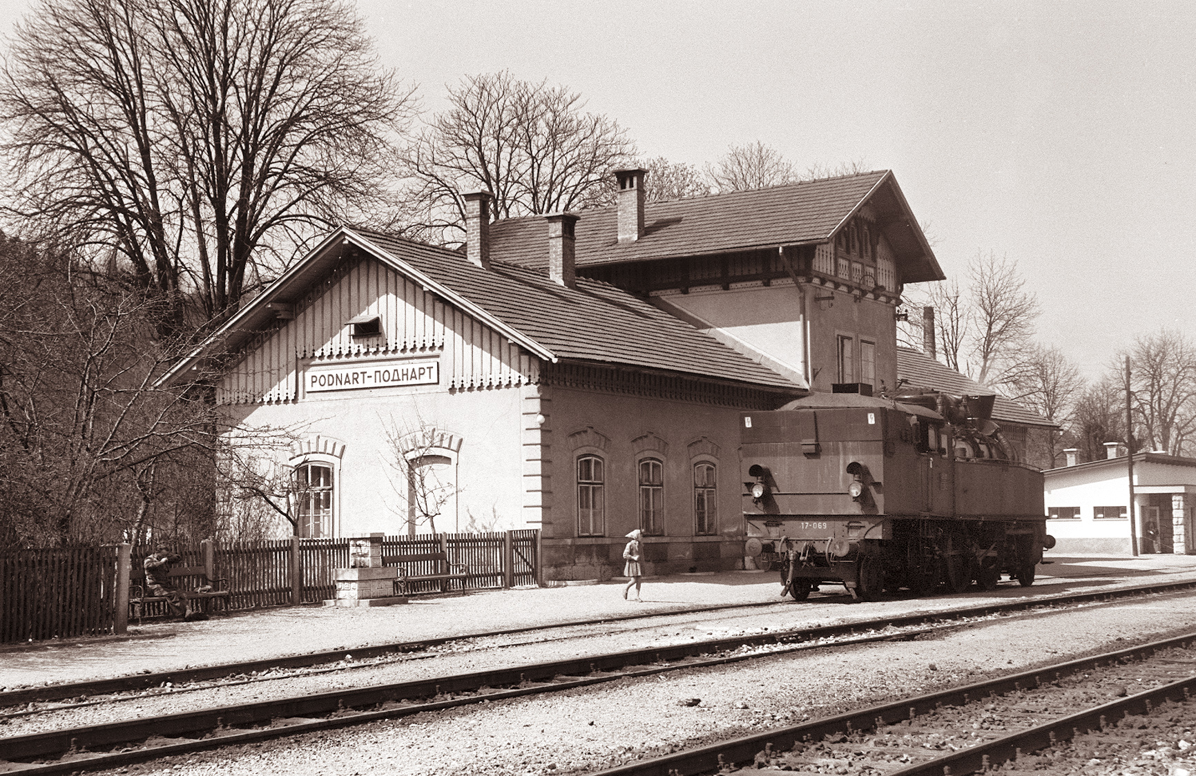 Železniška postaja v Podnartu na Gorenjskem